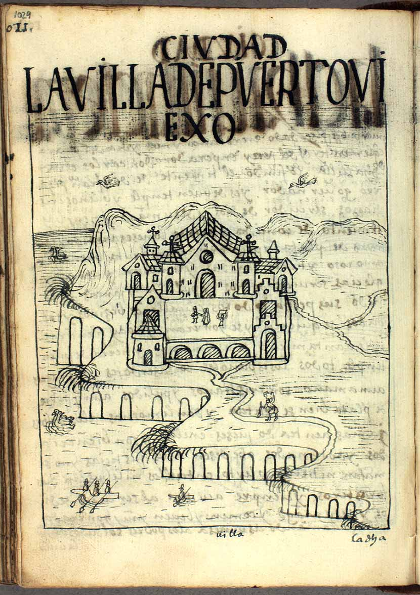 Dibujo idealizado de la Villa de Puerto Viejo, constado en la obra Crónica y Buen Gobierno de Felipe Guamán Poma de Ayala.[1]